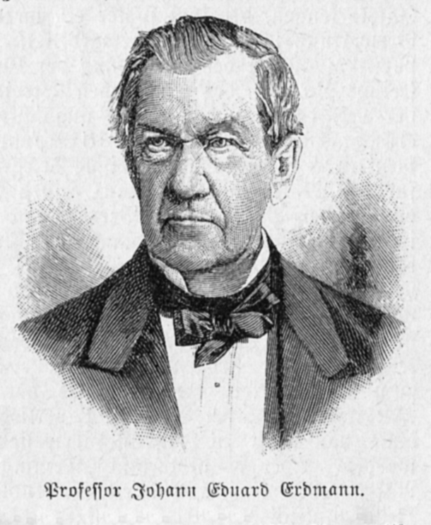 Johann Eduard Erdmann - Daheim-Kalender 1894, S. 253